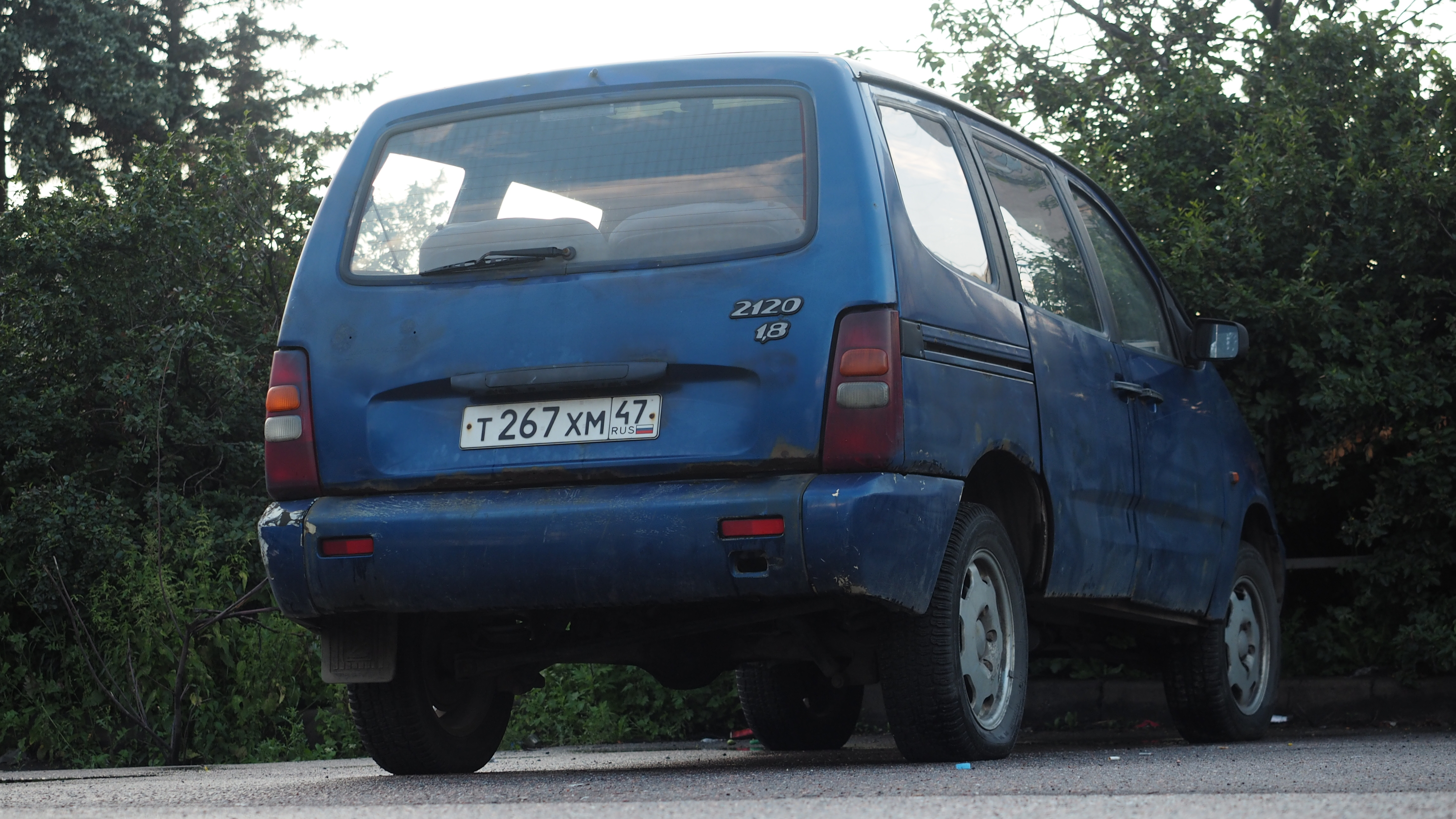 ВАЗ-2120 Санкт-Петербург